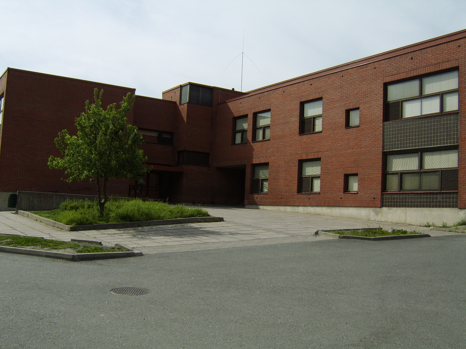 F entrance to Turun normaalikoulu Architect Björn Krogius, 1980.